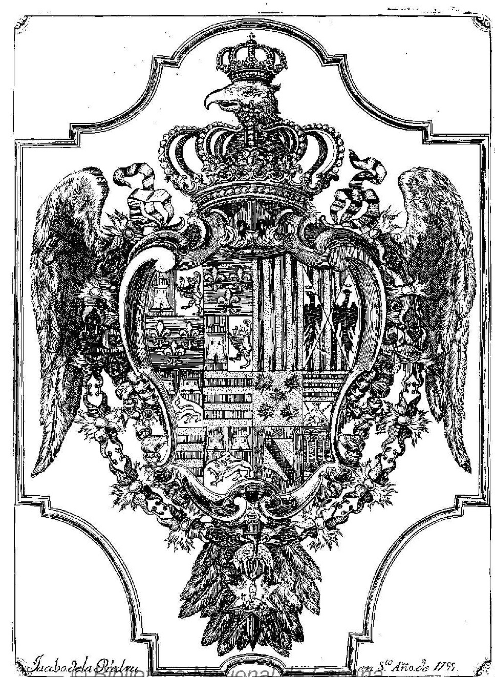 Oracion funebre panegyrica que en las honras que celebró el afecto y lealtad de los Criados dependentes de la secretaria, contaduria y archivo del Exmo. Sor. Duque de Medina Celi, por su ... Senora [sic] Da. Teresa Moncada y Benavides ... dixo el R.P. Fr. Francisco Antonio Freyle, predicador ... de la Regular Observancia de N.P.S. Francisco ; en la Iglesia Parroquial de San Sebastian el dia 31 de mayo de este año de 1756 En Madrid en la Oficia de D. Gabriel Ramirez, calle de Atocha, 1756 Anteportada con escudo heráldico firmado por Jacobo de la Piedra en Sto. Año de 1755